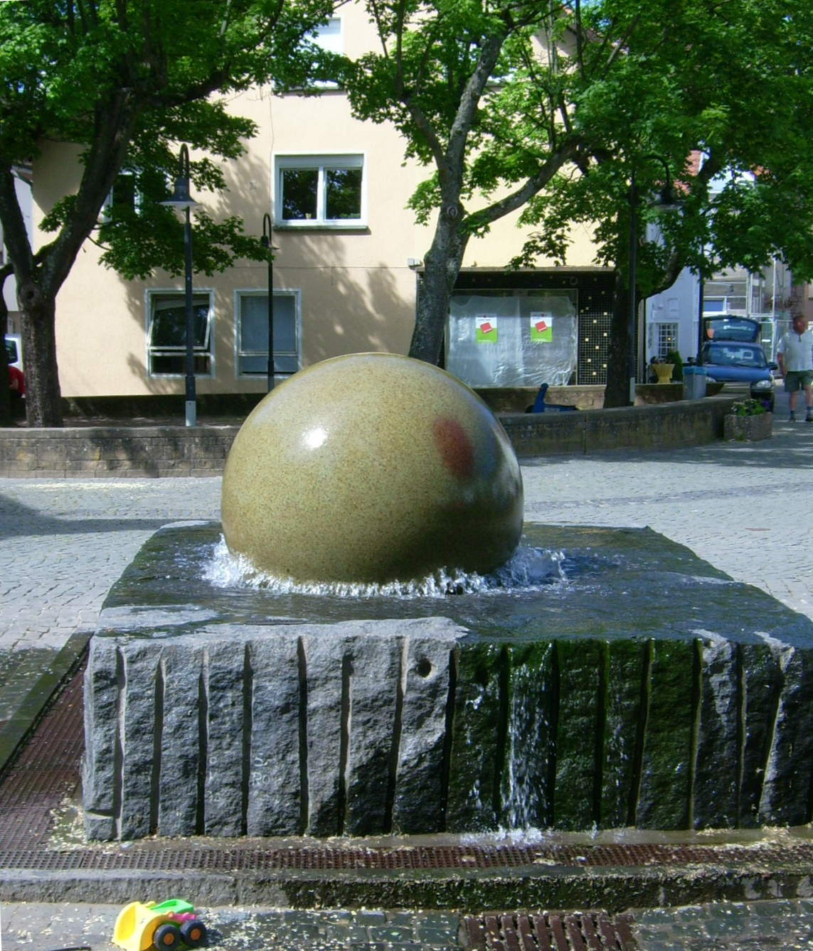 Brunnen in St. Wendel Gleitlager